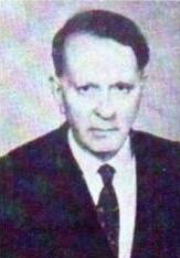 Atsız'ın 1940 yılına ait bir fotoğrafı.